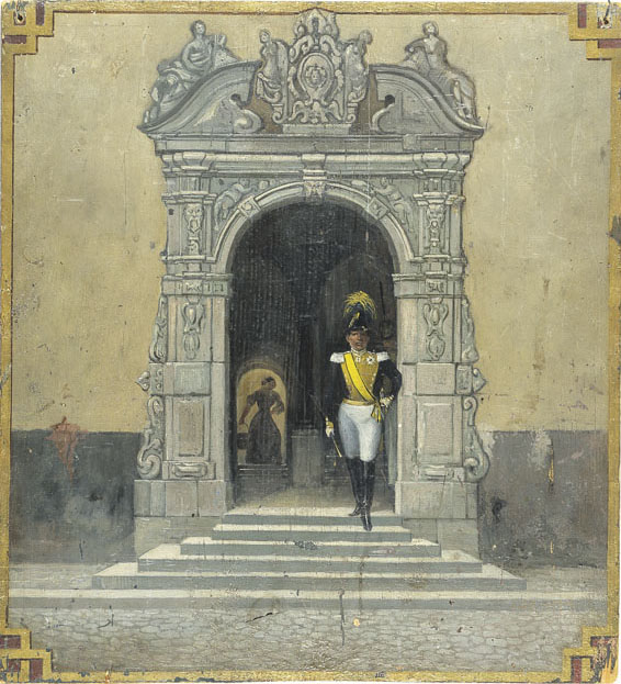 Porten till Castenhoflabel QS:Lsv,"Porten till Castenhof"